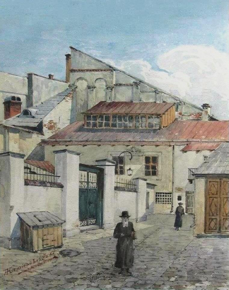 Синагога Золотая Роза